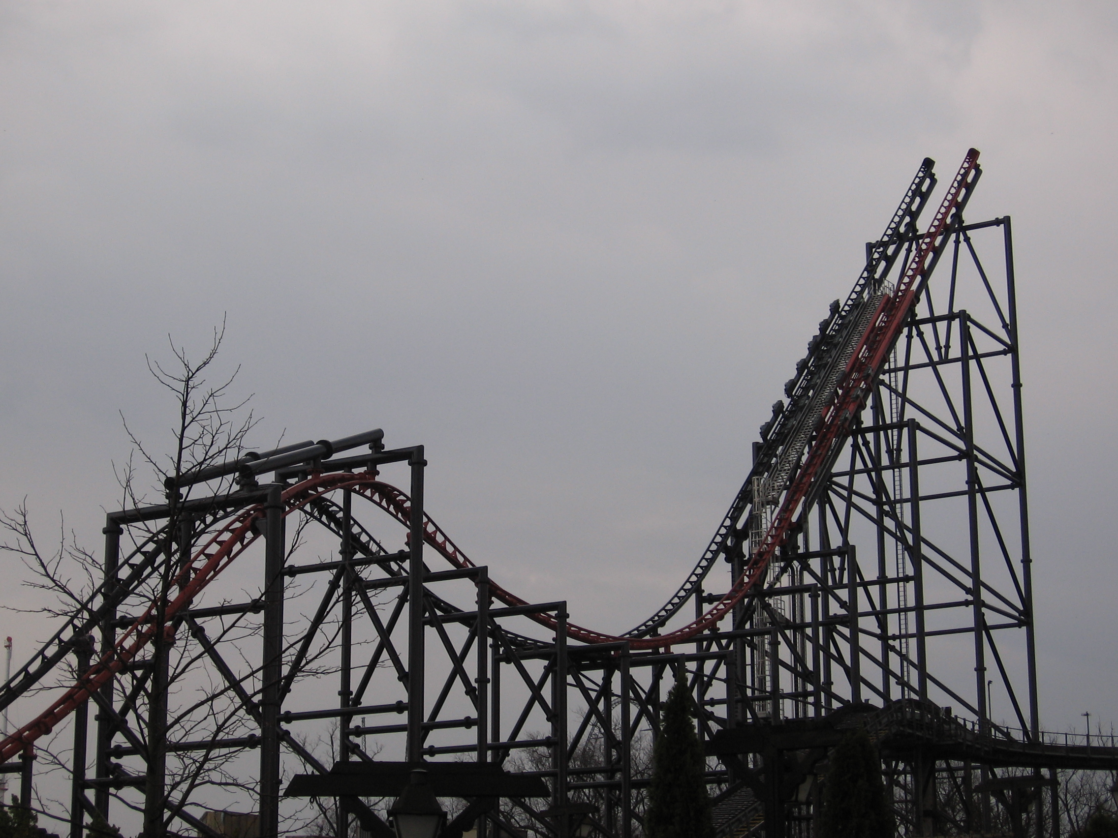 Took it myself. Dusso Janladde 04:38, 2 April 2006 (UTC)